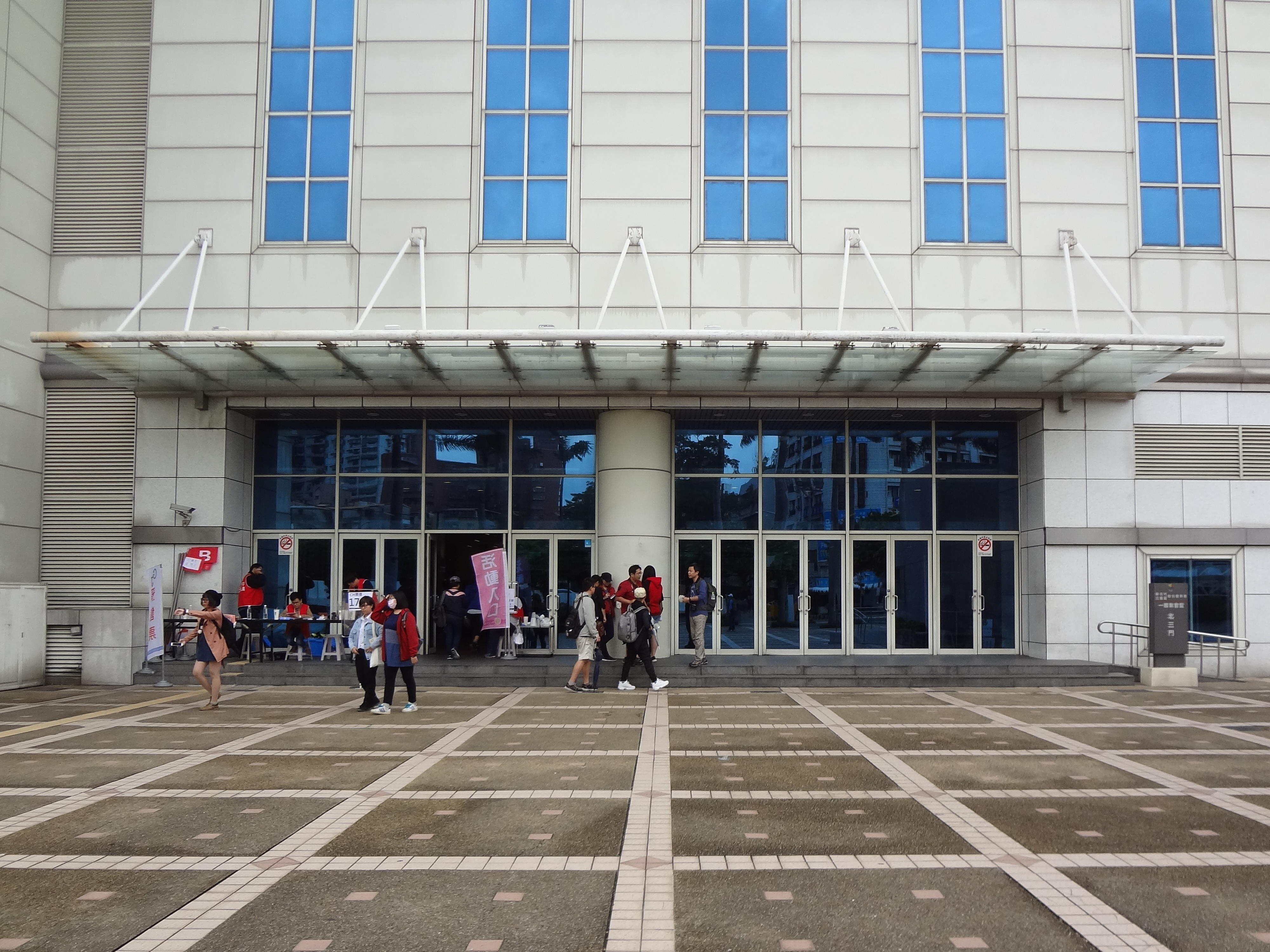 第5屆漫創地平線，售票處與活動入口設於新北市三重區綜合體育館北三門。